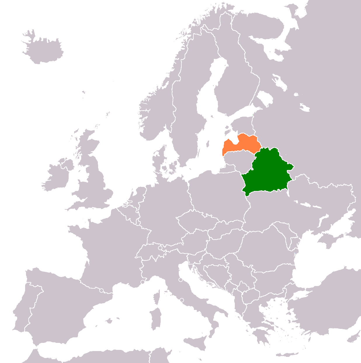 Belarus-Latvia locator map.